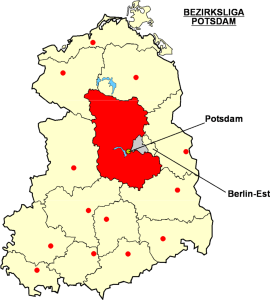 Localisation de Potsdam dans la "Bezirksliga Potsdam" Catégorie:Logo de clubs de football - Allemagne